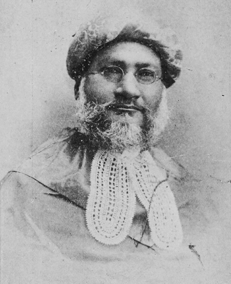 Badruddin Tyabji (Tyab Ali) (1844–1906)